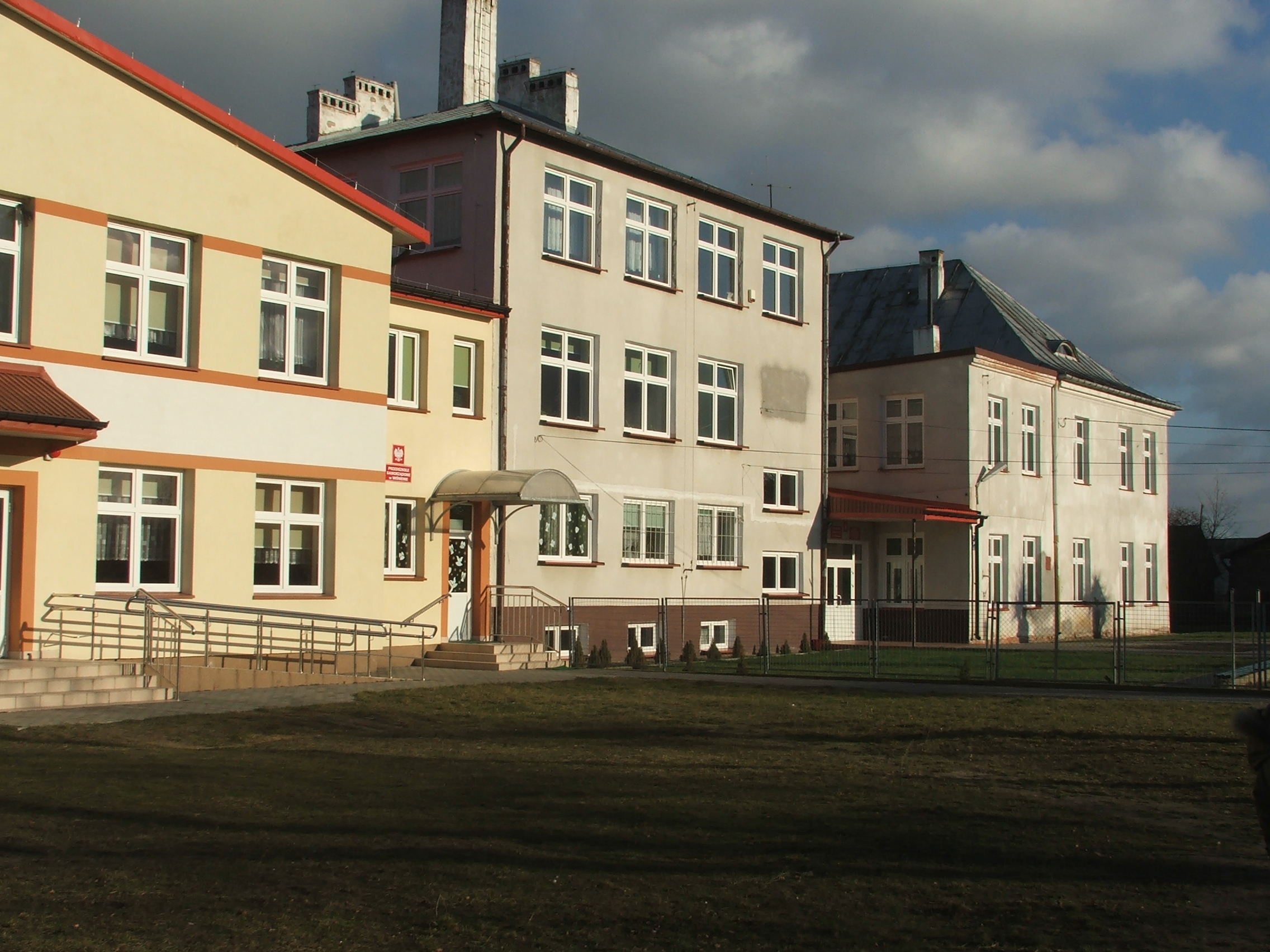 Zespół Oświatowy w Wiśniewie